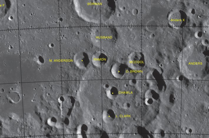 Cráter lunar Apolo. Cráteres interiores en memoria de la tragedia del Columbia. (Imagen LRO)